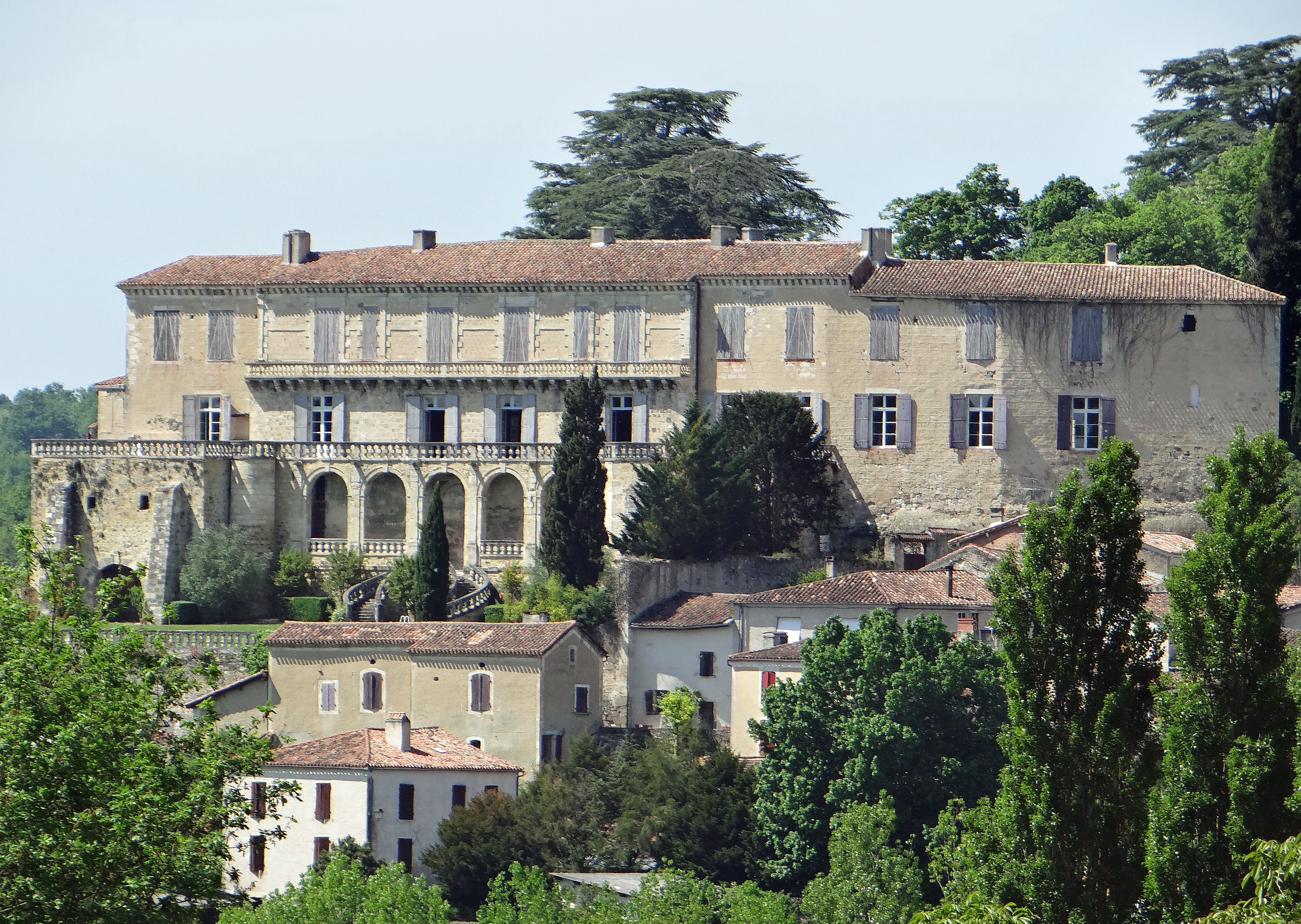 Château de Poudenas - Vue d'ensemble